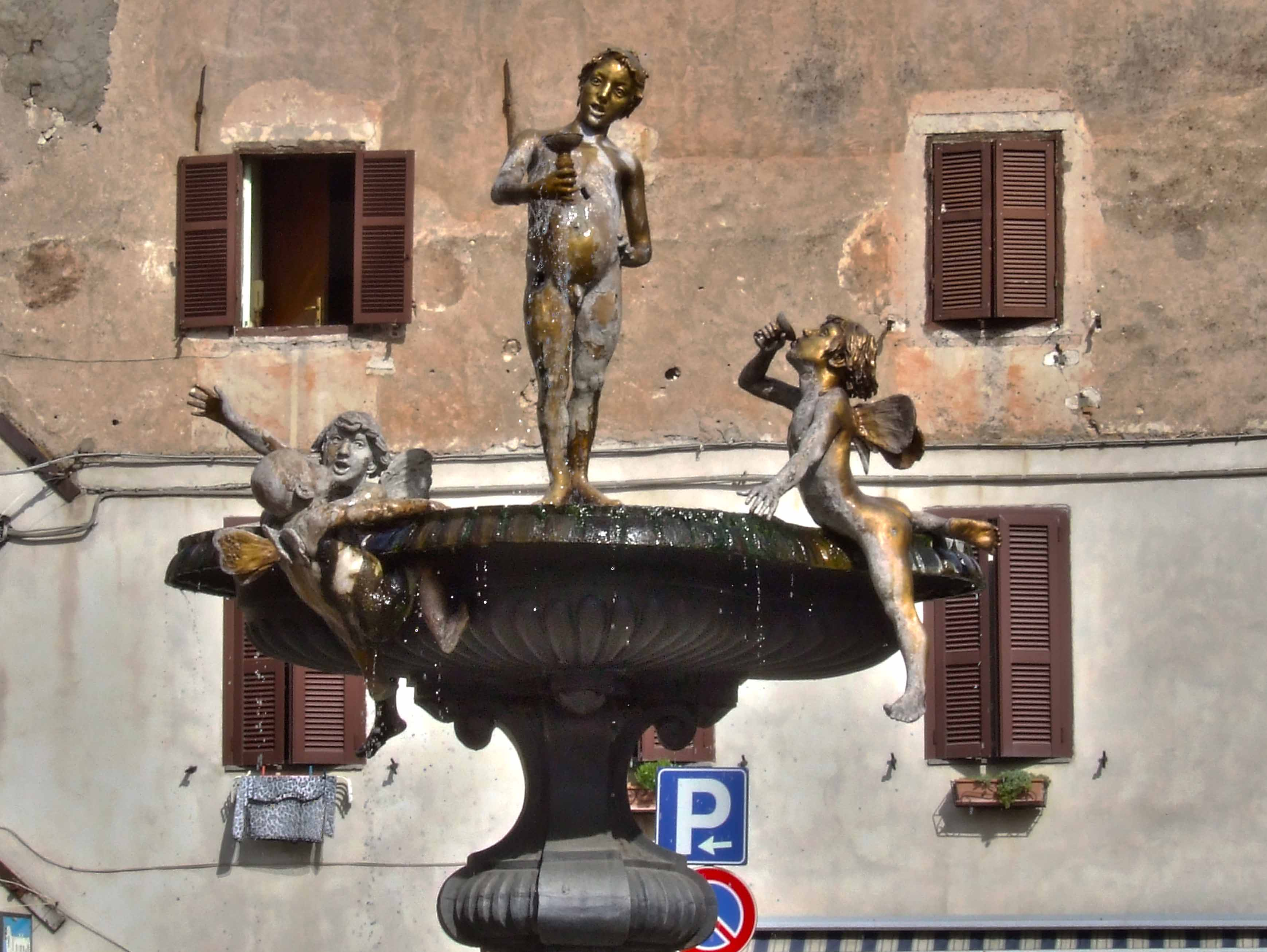 LA FONTANA DI MONTELANICO Uno sguardo alla sua architettura Su richiesta del Comune di Montelanico, Ernesto Biondi nel gennaio del 1891 propone un bozzetto per la realizzazione di una fontana. La giunta comunale in fase di definizione dell’incarico, suggerì di rendere più agevoli le due bocche d’acqua per l’uso pubblico, il suggerimento fu accettato e il risultato sono le due colonnine, che attraverso un mascherone, erogano un eguale e costante flusso d’acqua dal 27 Ottobre 1891. La fontana si compone di una vasca quadrilobata in travertino, sollevata dal piano stradale da una base più ampia che ne ripete il motivo mistilineo. I quattro lobi sono raccordati da altrettanti setti terminanti ad angolo retto. Al centro della vasca, su di una base cubiforme in travertino si alza imponente un balaustro in ghisa, questo sostiene a sua volta un catino dello stesso materiale. Sul labro del catino, tre puttini alati con lo sguardo all’insù guardano esterrefatti un giovinetto, il quale con un fare naturale ostenta con la mano destra un calice dal quale esce un copioso zampillo. L’acqua raccolta nel catino sfiora verso l’esterno formando una cascata di rivoli che si riversa nella sottostante vasca. Allegoricamente questa studiata teatralità vuole significare la grande disponibilità d’acqua di cui godeva il Comune di Montelanico e la scarsità di cui soffrivano alcuni dei Comuni limitrofi. Ma in questo capolavoro l’autore dà il meglio di sé come architetto, riuscendo a dare armonia all’intera immagine architettonica facendo dialogare i tre diversi materiali: il travertino, il bronzo e una novità tecnologica, la ghisa, coniugando in modo eccellente tradizione e modernità. (Alessandro Ippoliti)